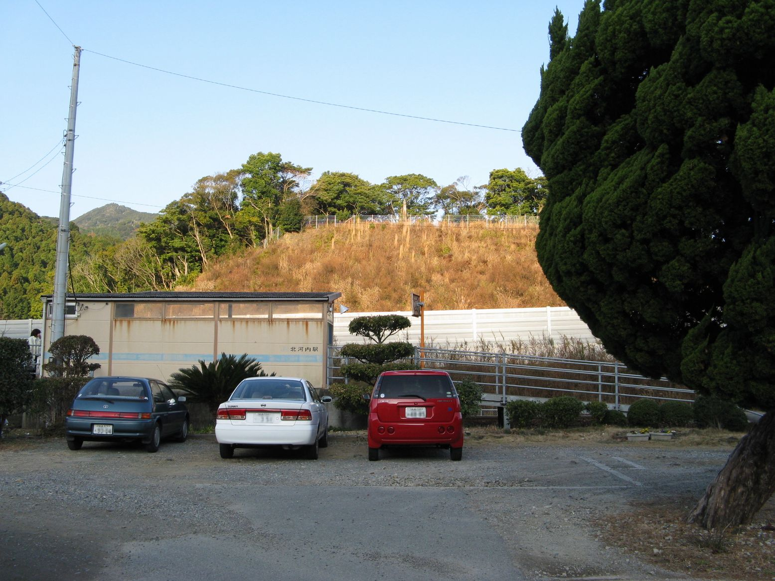 牟岐線北河内駅 駅舎